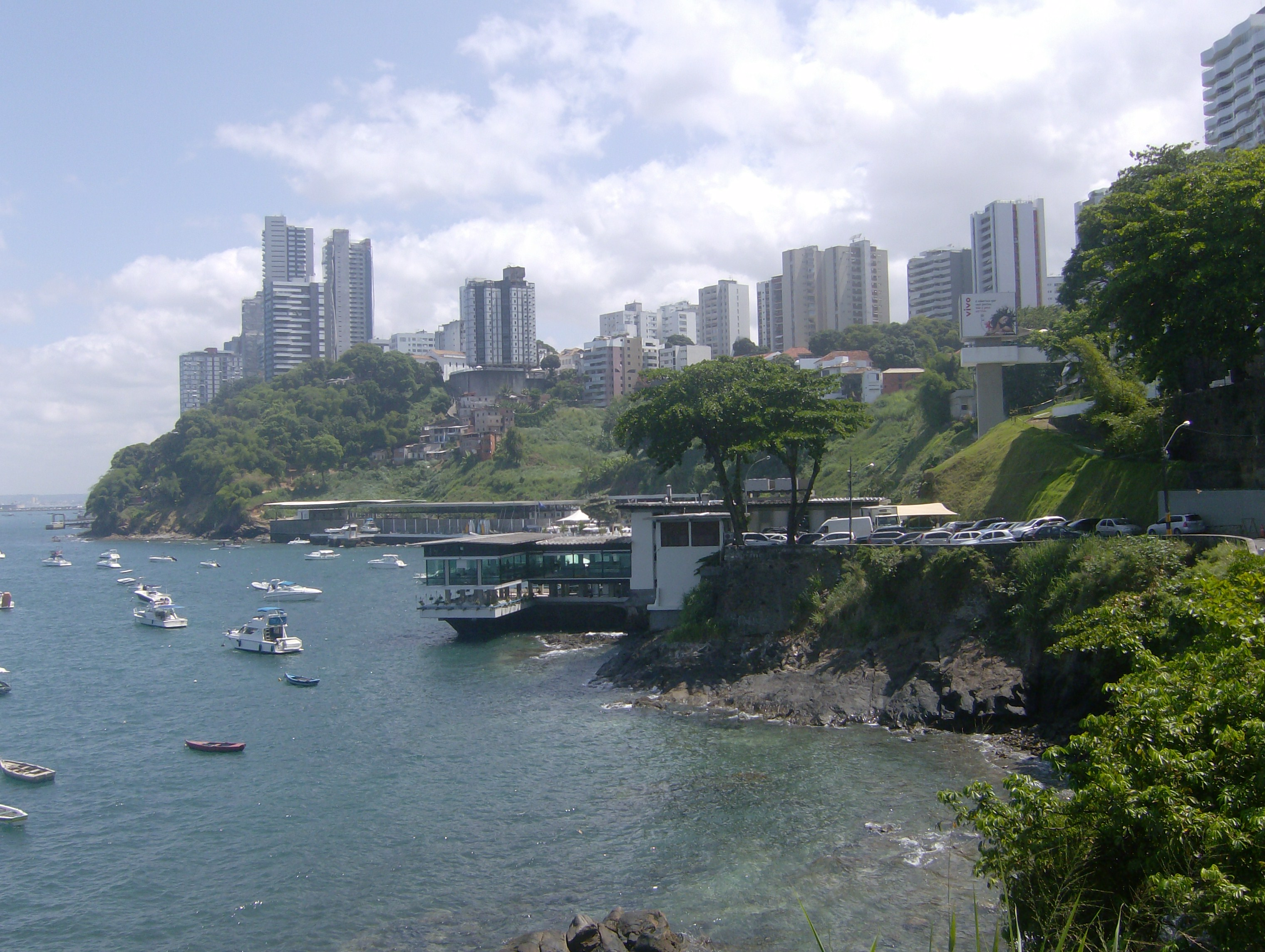 O Yacht Club da Bahia em Salvador, Bahia, Brasil.